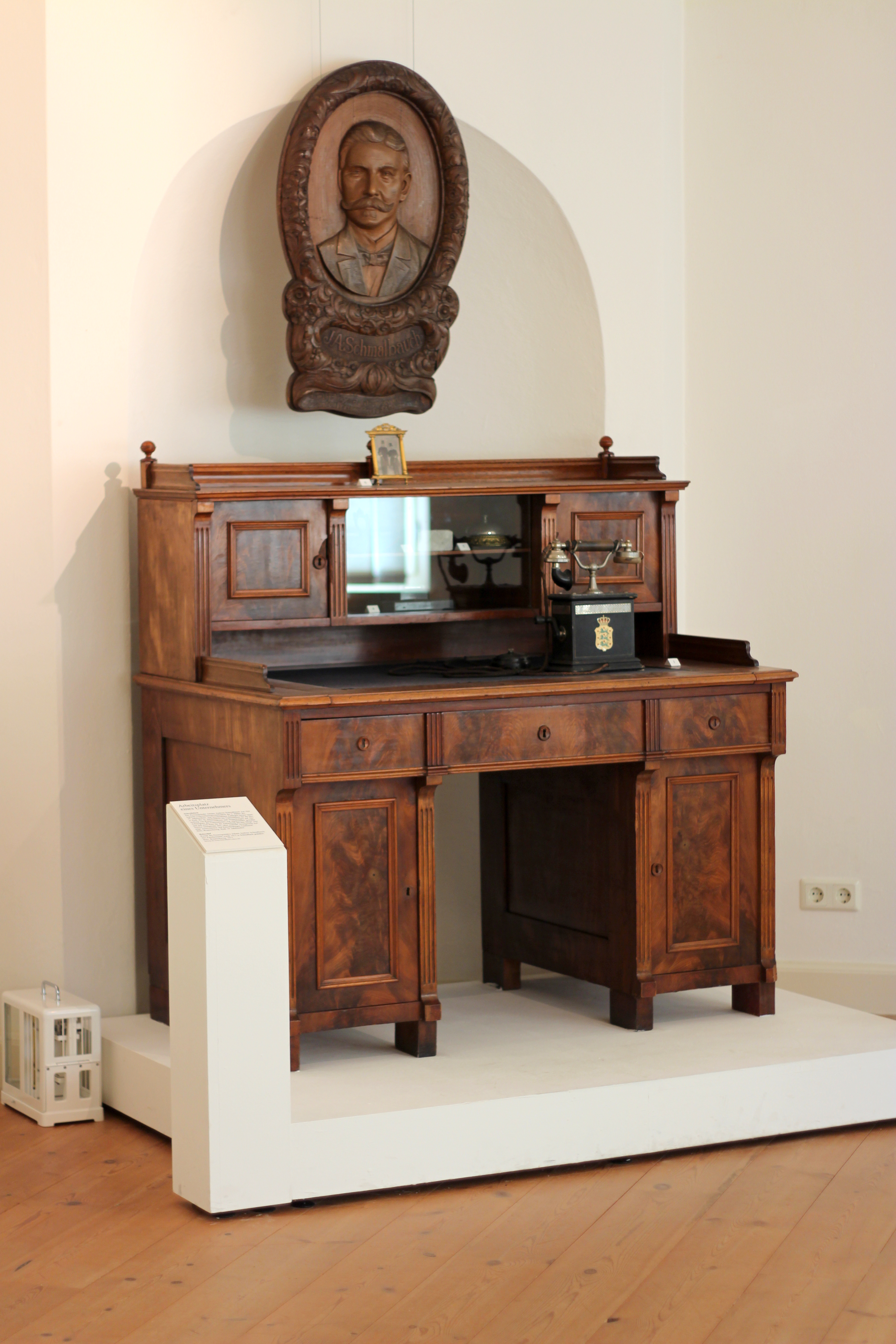 Braunschweigisches Landesmuseum. Wikimedia Deutschland. Juni 2014.